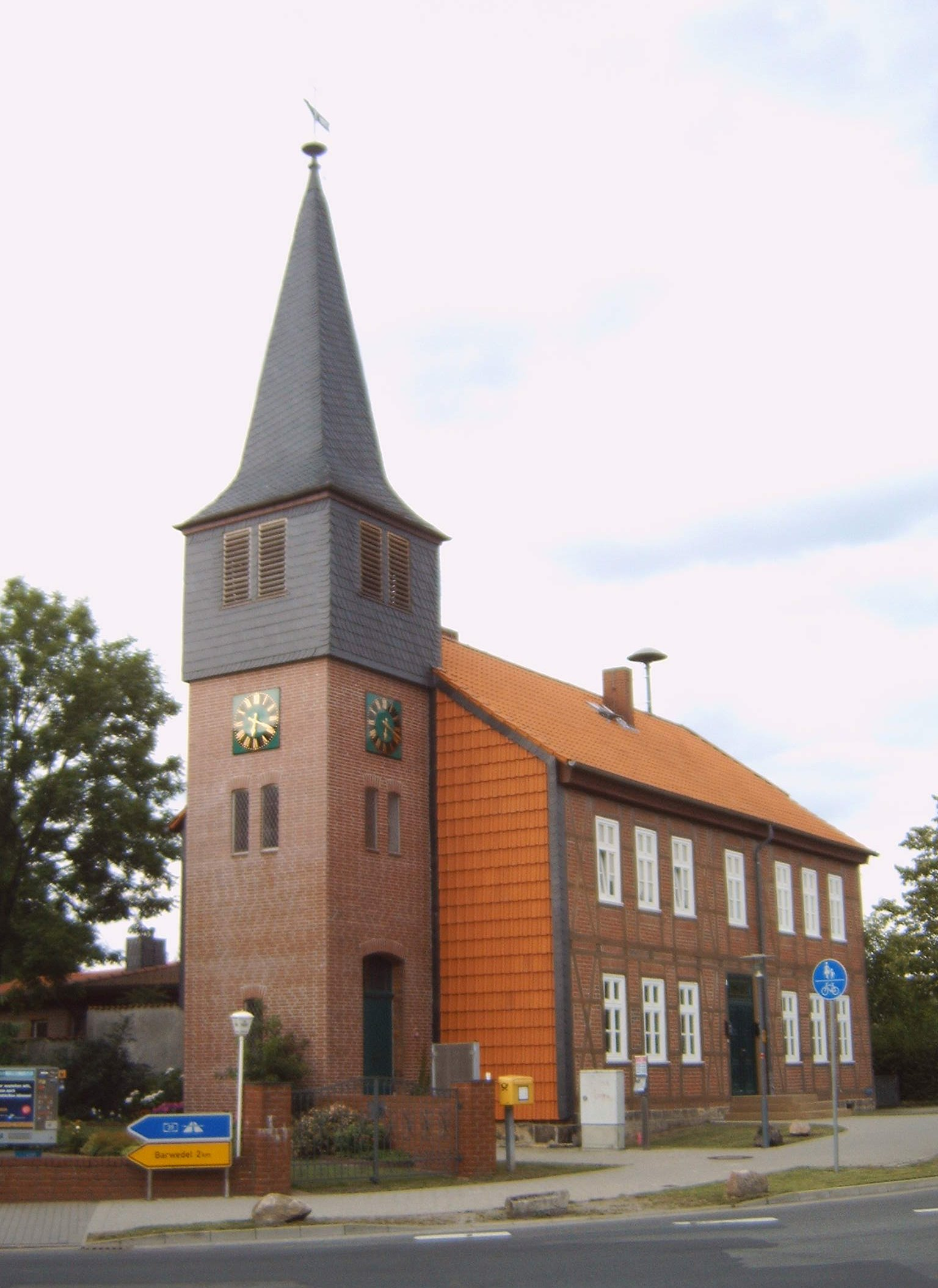 Dorfkirche in Tiddische, Niedersachsen